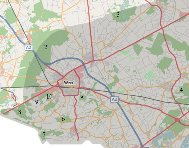 Bossen rondom Weert